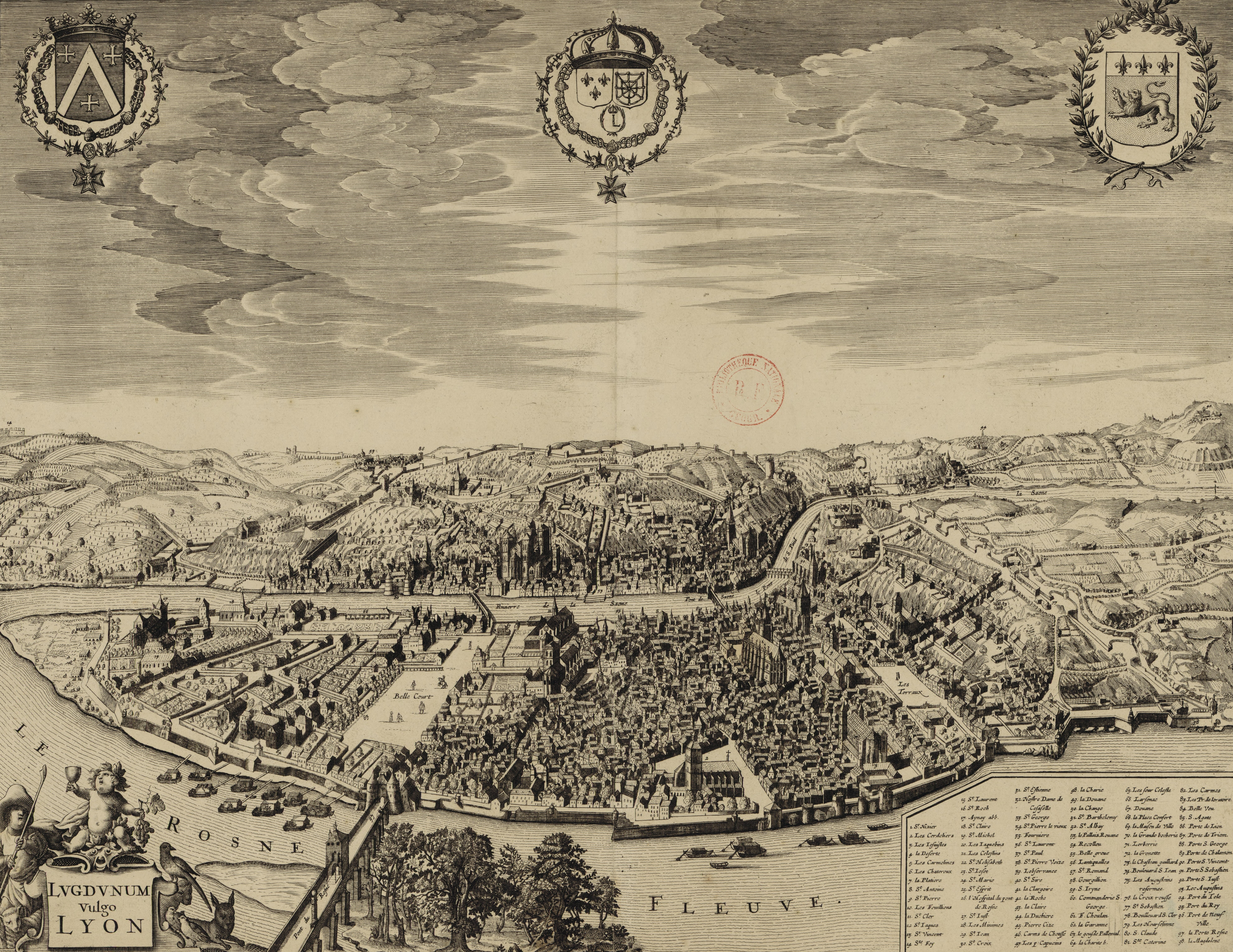 Lugdunum vulgo Lyon.